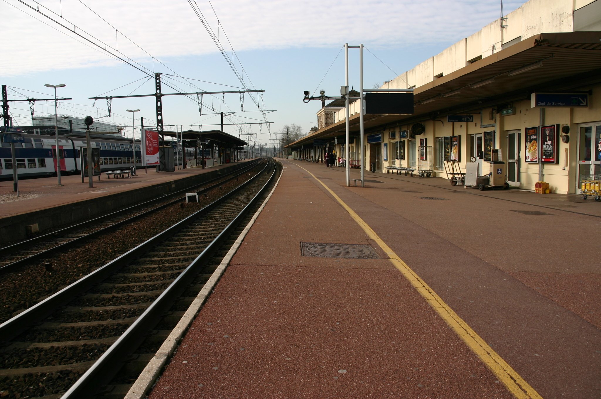 La gare de Melun, Melun, département de la Seine-et-Marne (France)